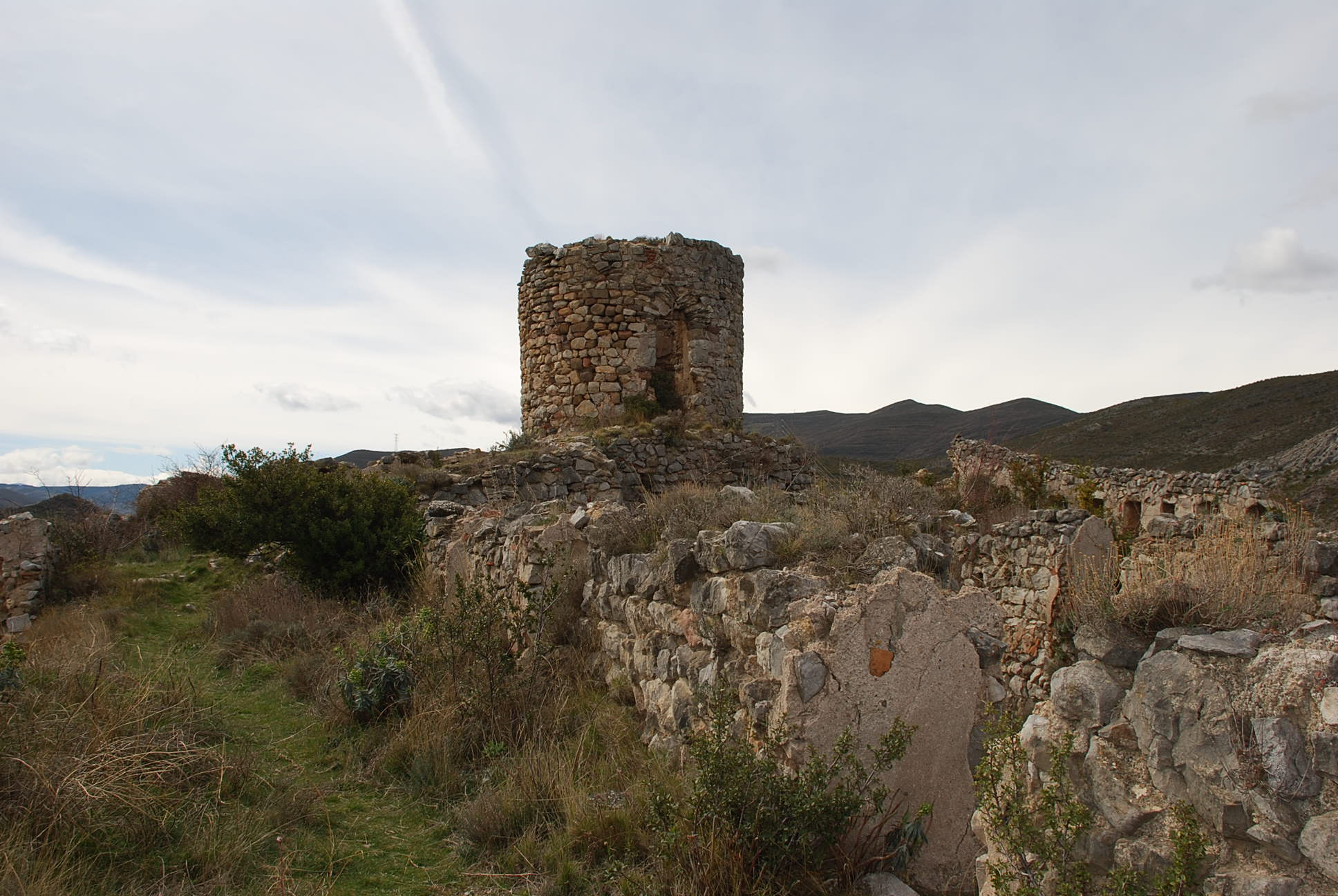 Castillo de Jubera en La Rioja, España.